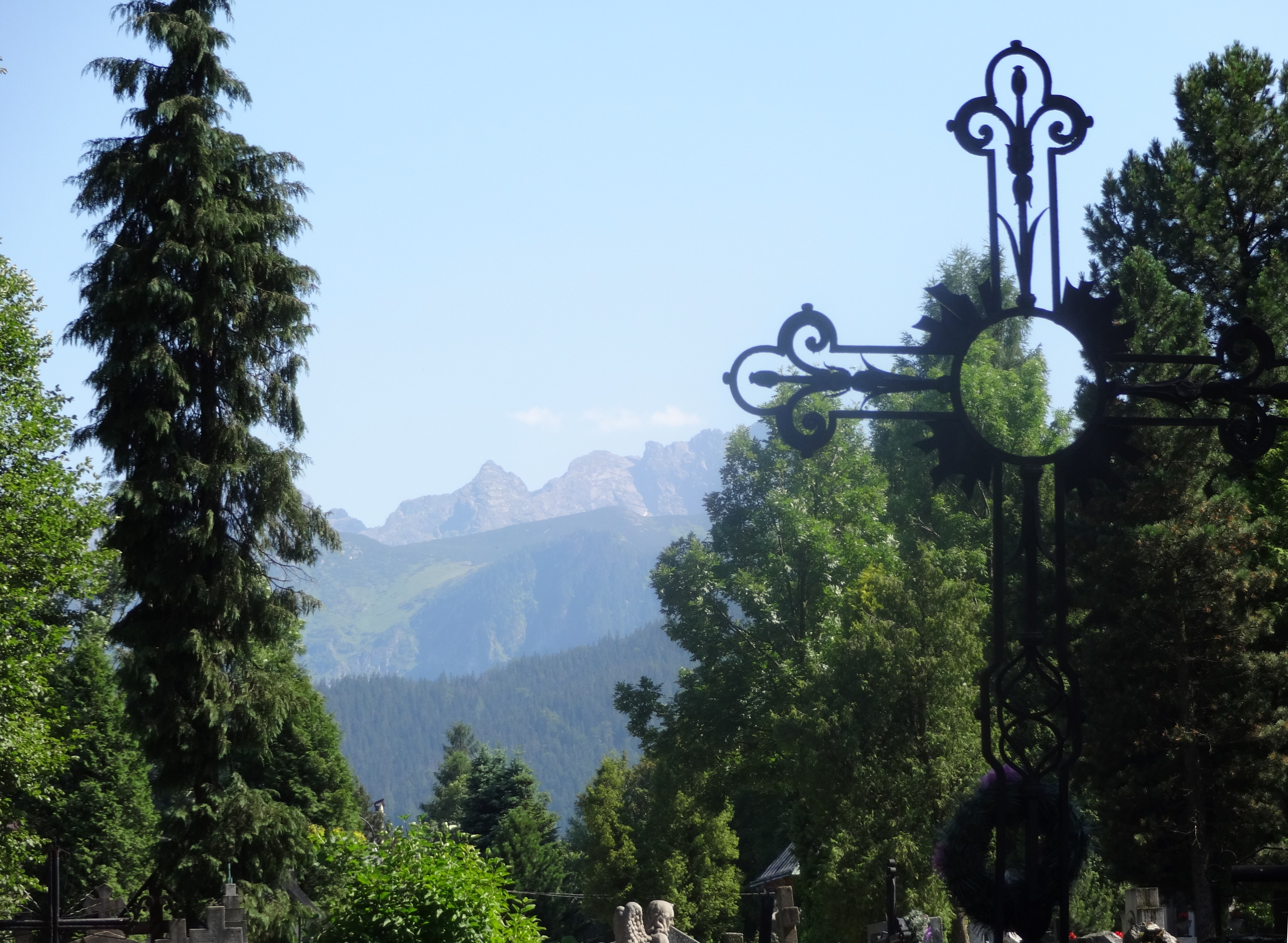 New Cemetery in Zakopane